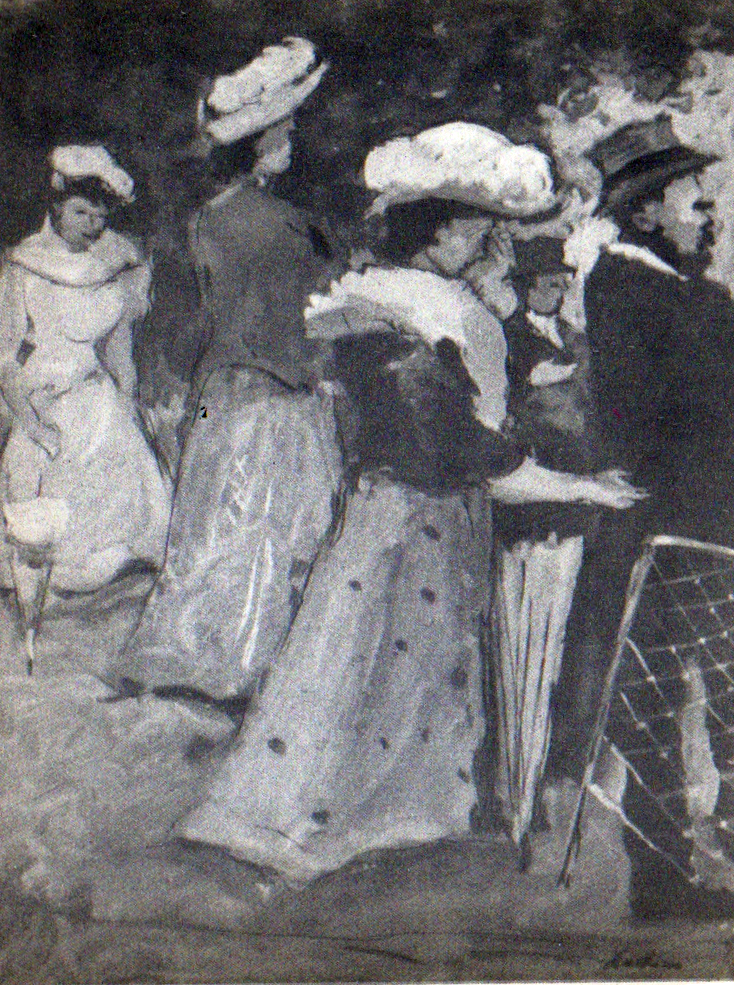 La curse